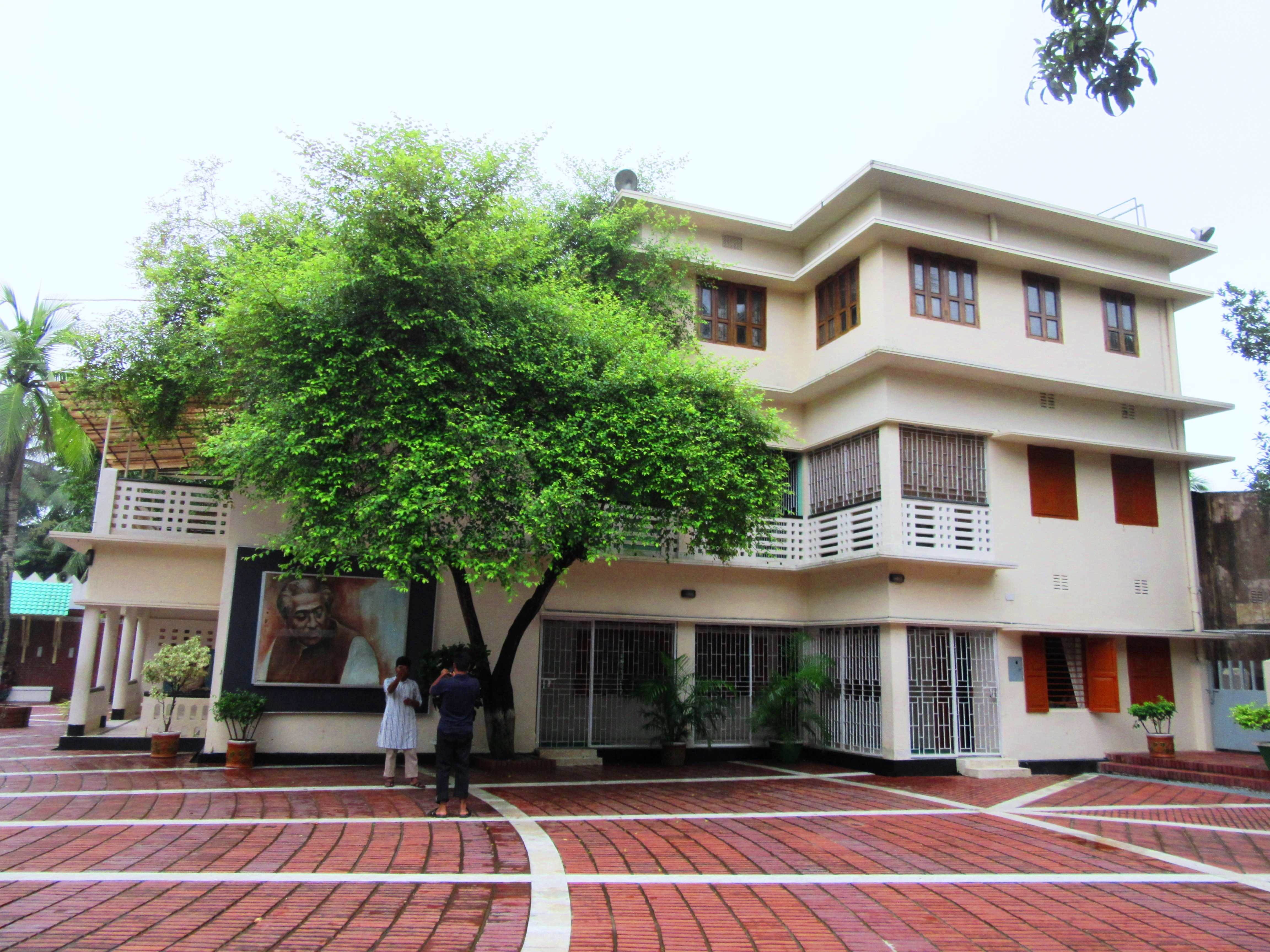 বঙ্গবন্ধু শেখ মুজিবুর রহমান ও তাঁর পূর্বপুরুষদের আবাসস্থল